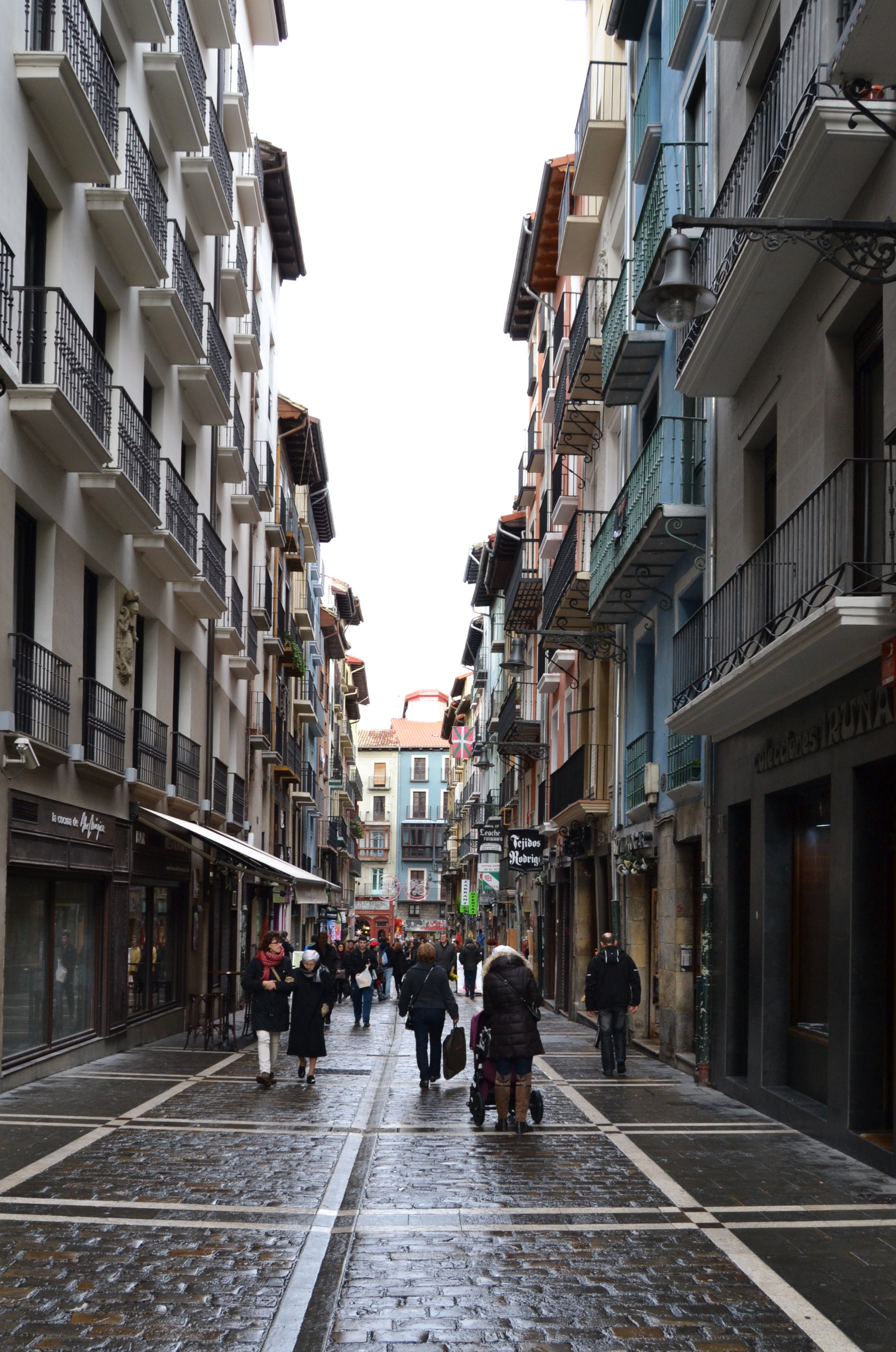 Estafeta kalea.